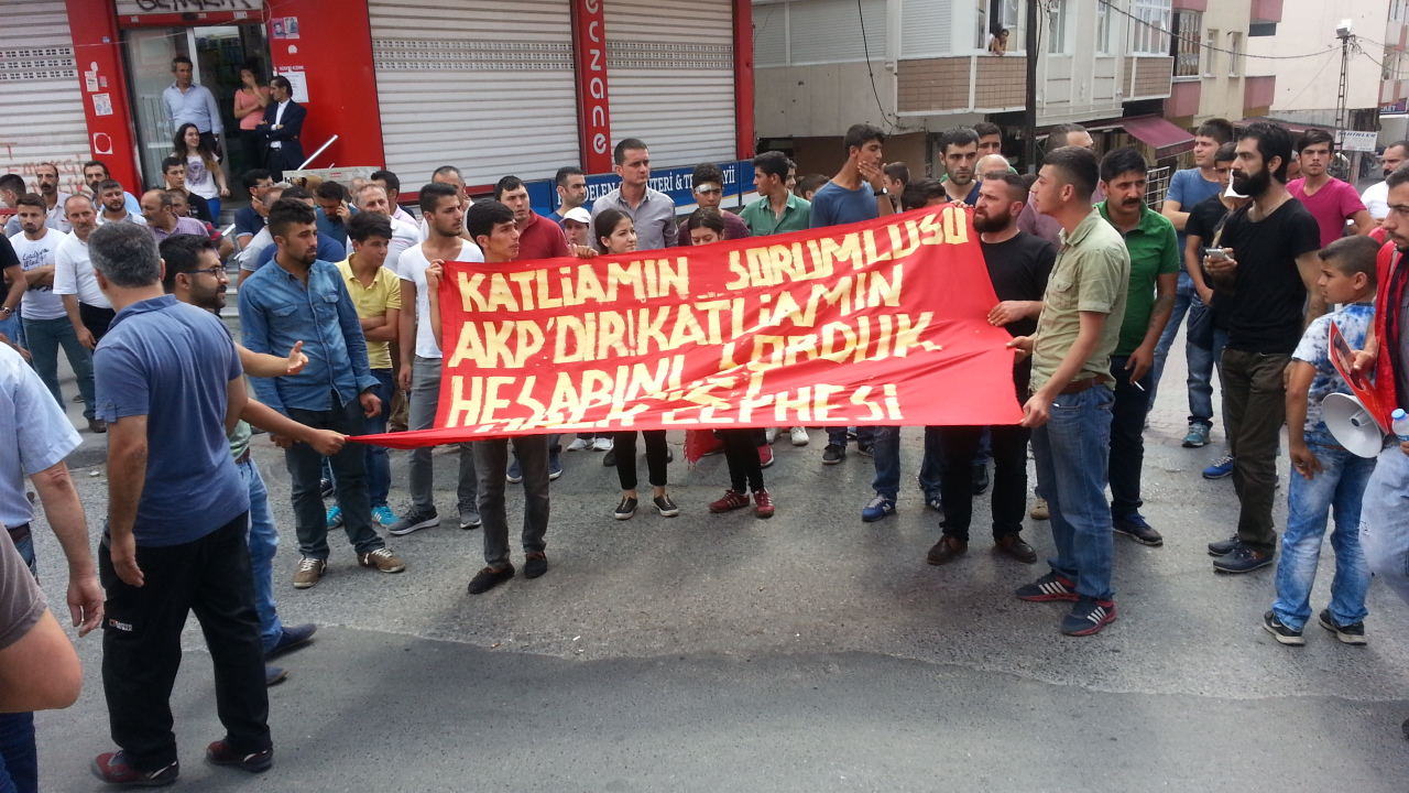 Kurdî: "Merasîma Oxirkirina Qurbanîyên Êrîşa Pirsûsê"